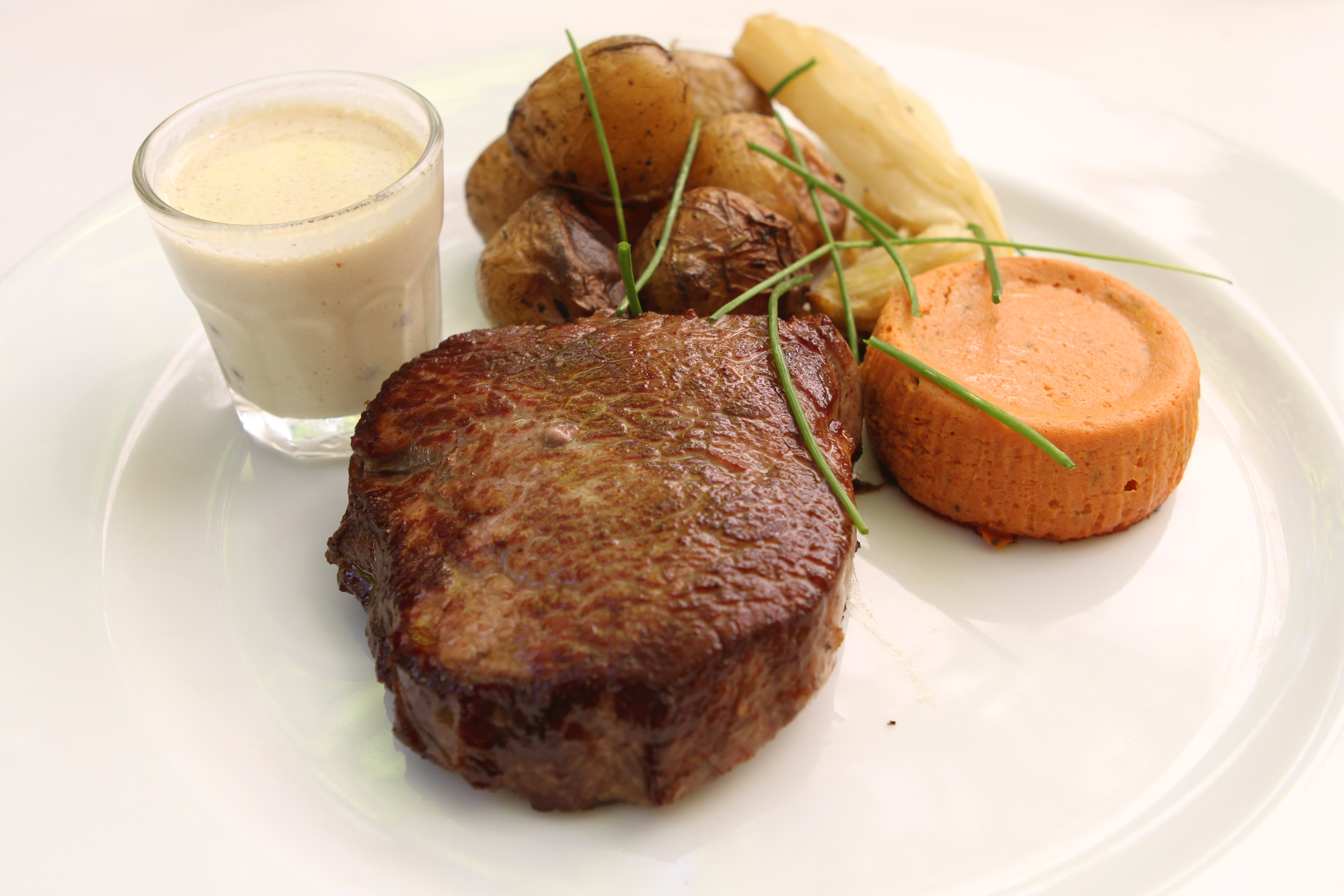 Filet de boeuf, sauce au poivre, petites patates et pâté de tomates (Tholonet, France).